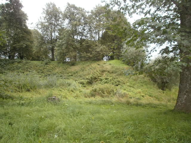 Vaade Salatsi linnuse läänebastionile. Ees osaliselt täidetud vallikraav.